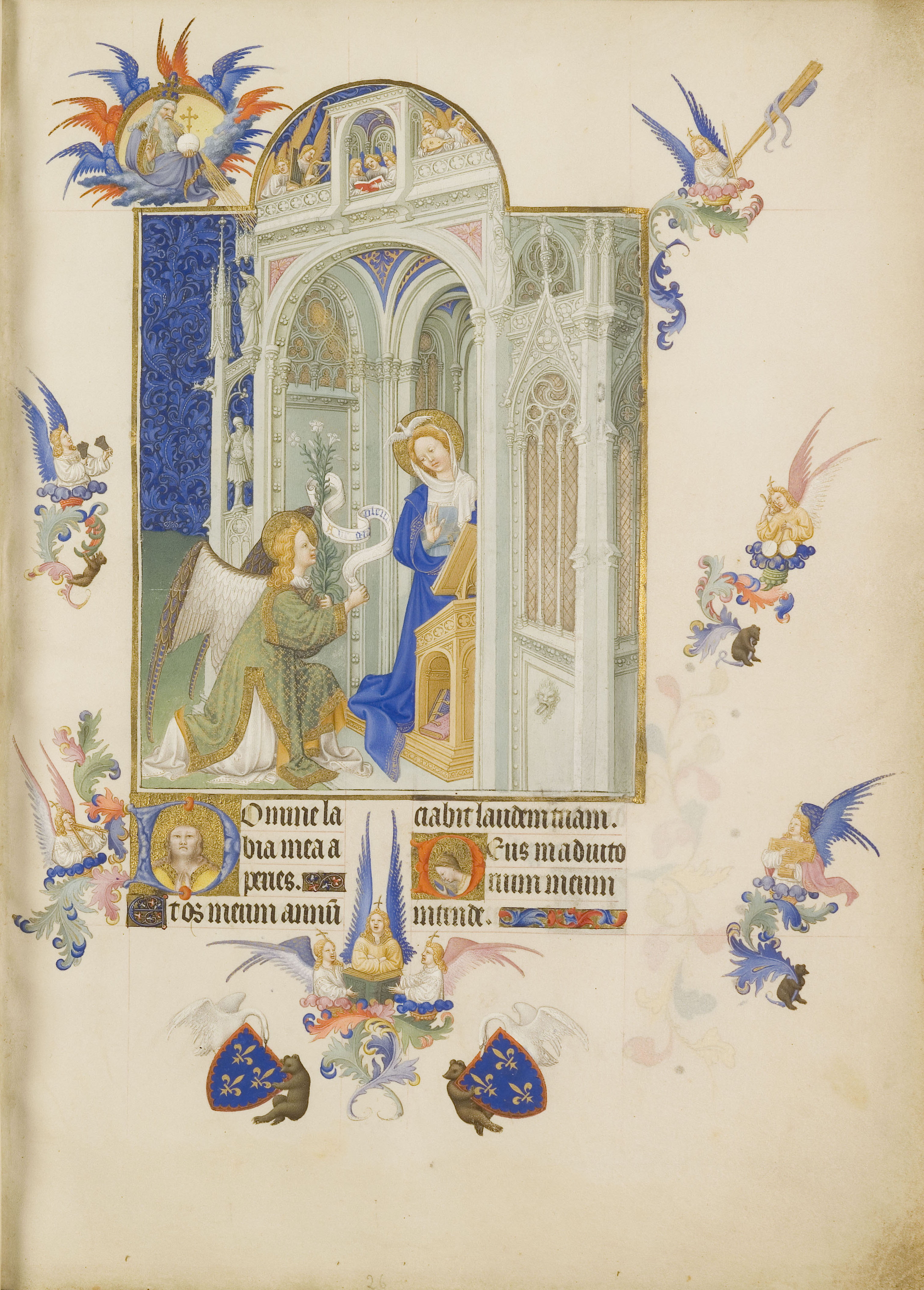 La vierge à un pupitre et l'ange Gabriel dans un bâtiment gothique. Dieu le père est présent hors du cadre en haut à gauche. La Miniature est entourées d'anges, d'ours et de cygnes portant en bas les armes du duc de Berry